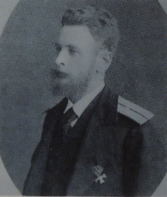 Строганов, Сергей Александрович